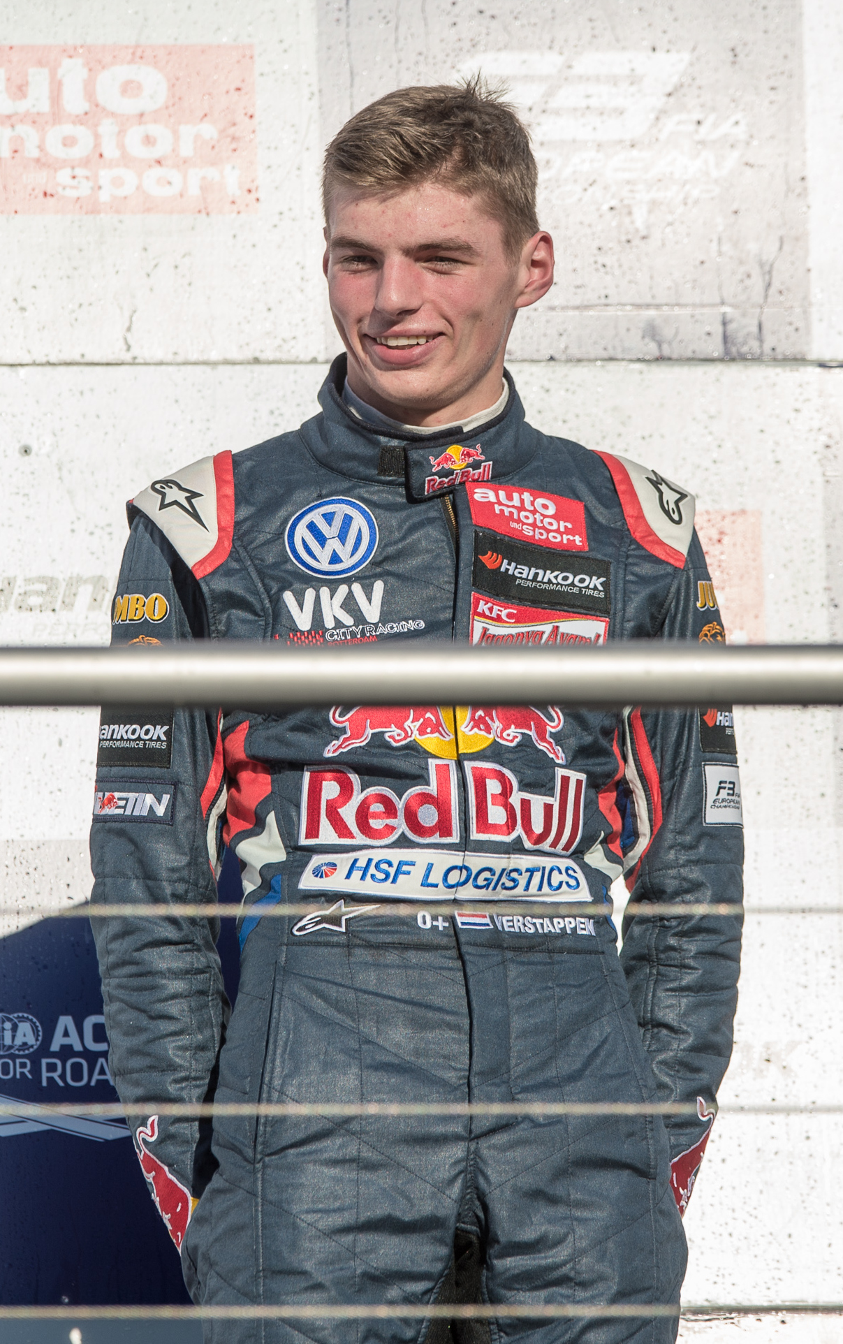 DTM,Deutsche Tourenwagen Masters,F3 FIA European Championship,FIA Formel 3 Europameisterschaft,Hockenheimring,Max Verstappen,Motorsport,Siegerehrung,Van Amersfoort Racing